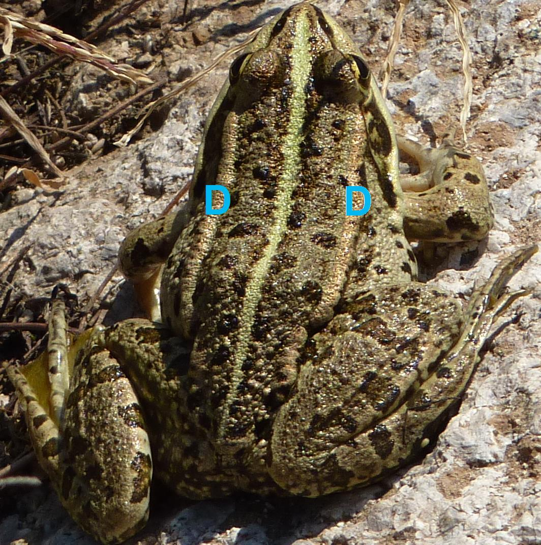 Cutted out of image File:A frog at Beglik Tash P1020610.JPG and tagged dorsolateral folds